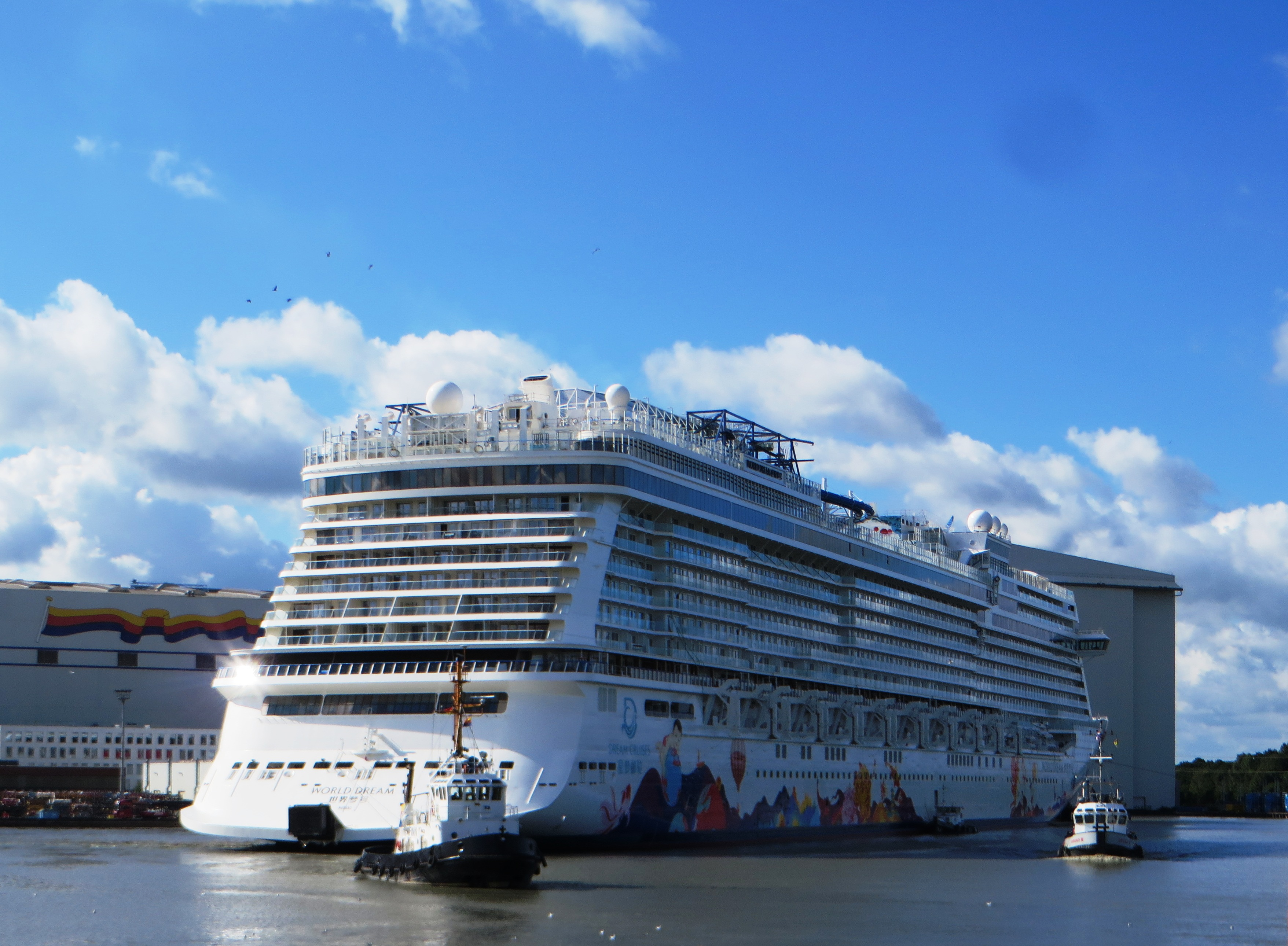 World Dream 2017